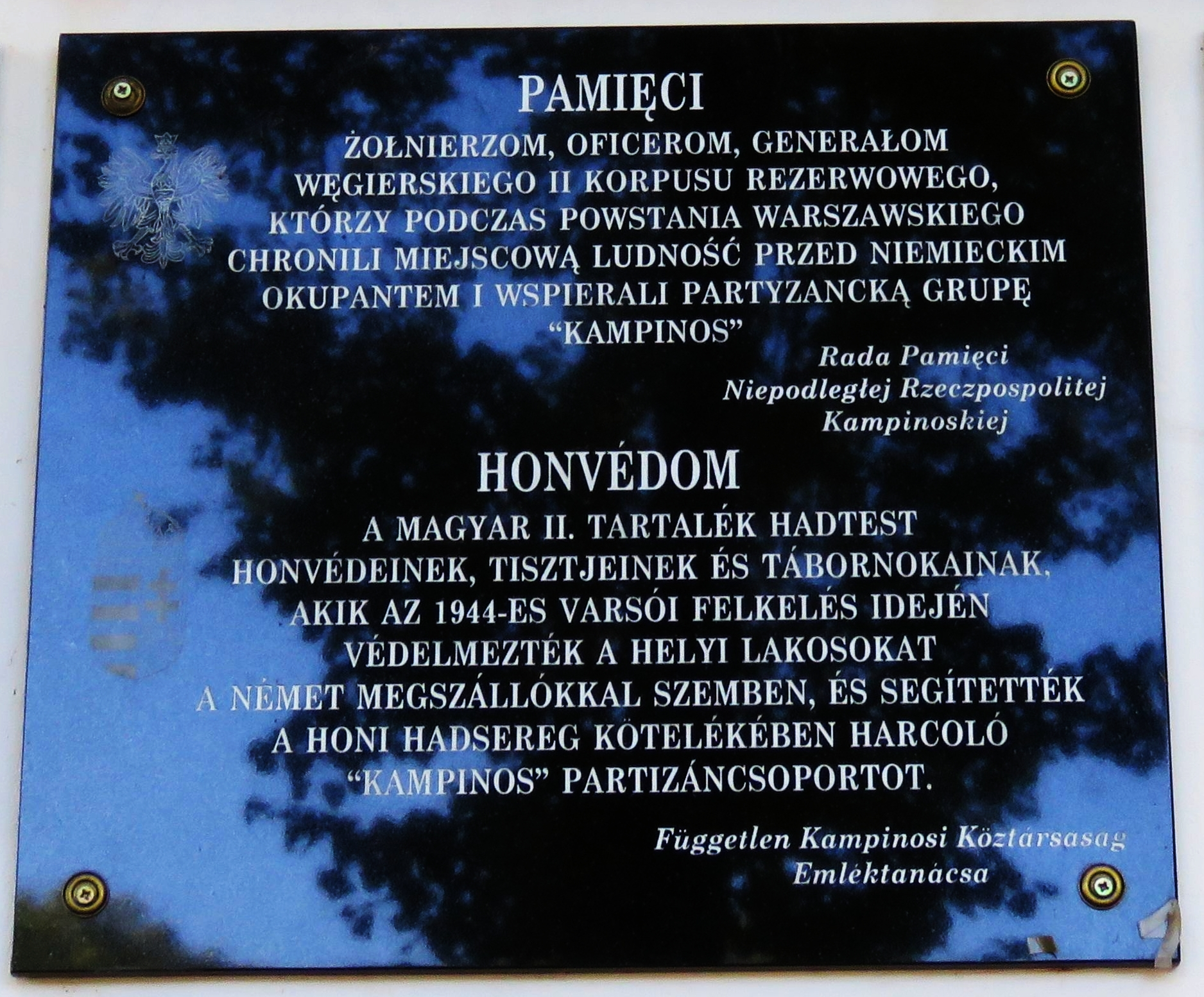 WIERSZE Kościół p.w. Św. Maksymiliana Marii Kolbe TABLICA NA KOŚCIELE 10